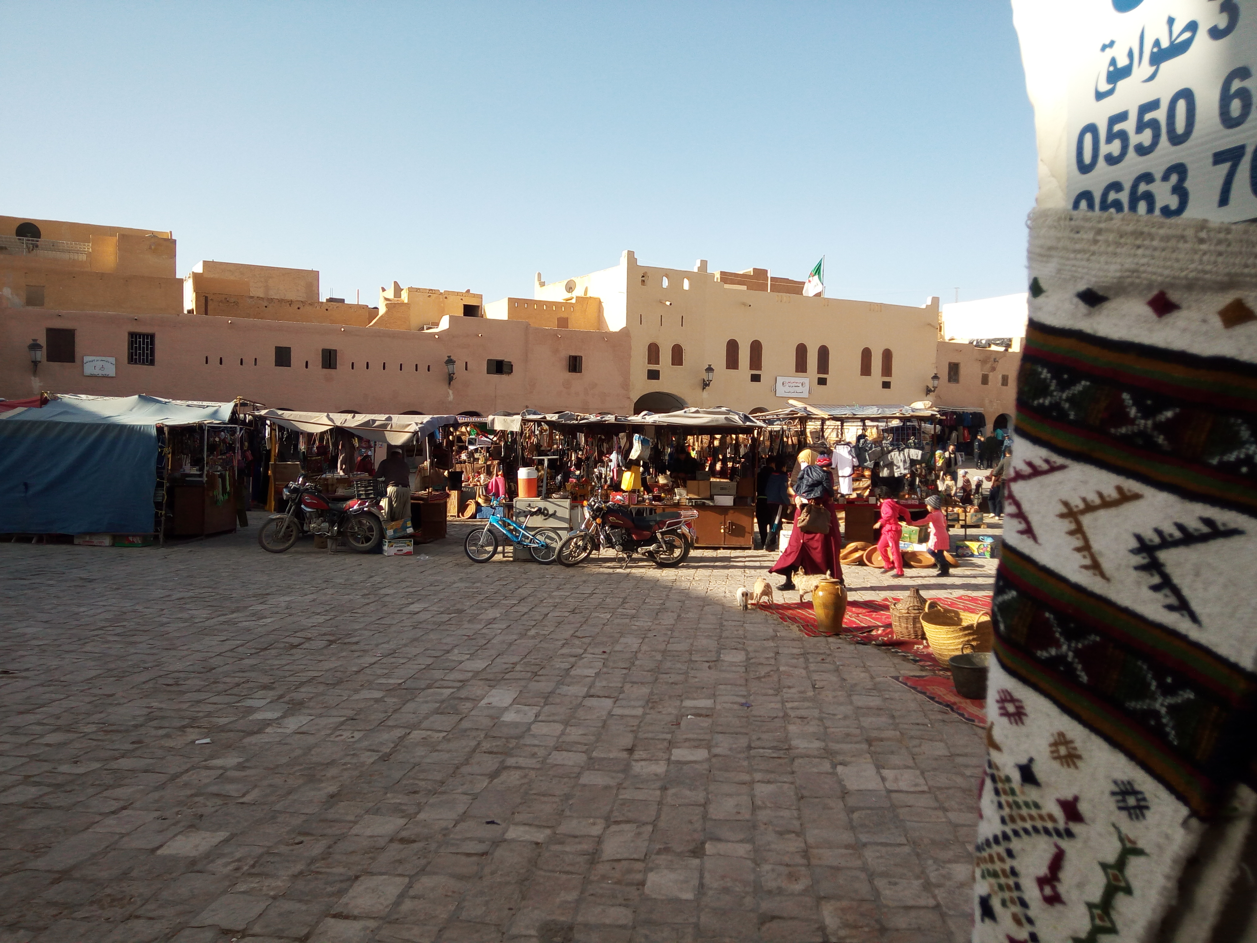 Marche de bani yazguan - Guardaya